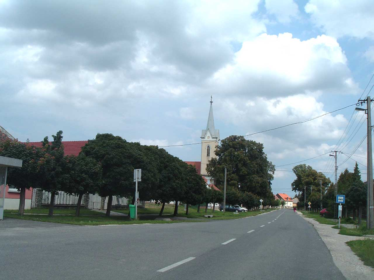 The main street of Szentkirály, Szombathely, Hungary. Szombathely-Szentkirályi Szent István Király római katolikus templom